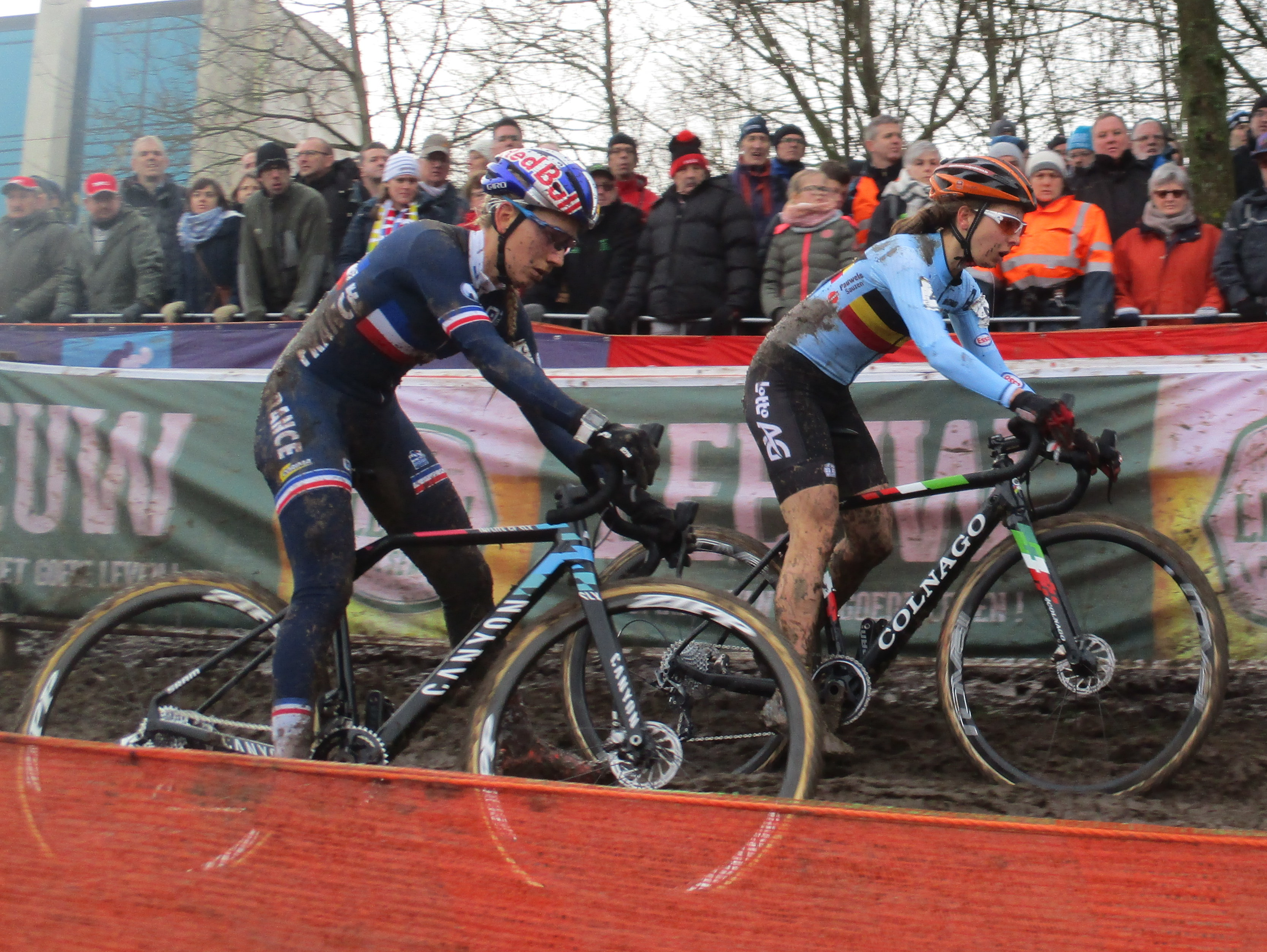 Wereldkampioenschappen Veldrijden op 3 en 4 februari 2018 op de Cauberg in Valkenburg, Limburg, Nederland. Wedstrijd van de vrouwen elite. Ronde 3 van 4.